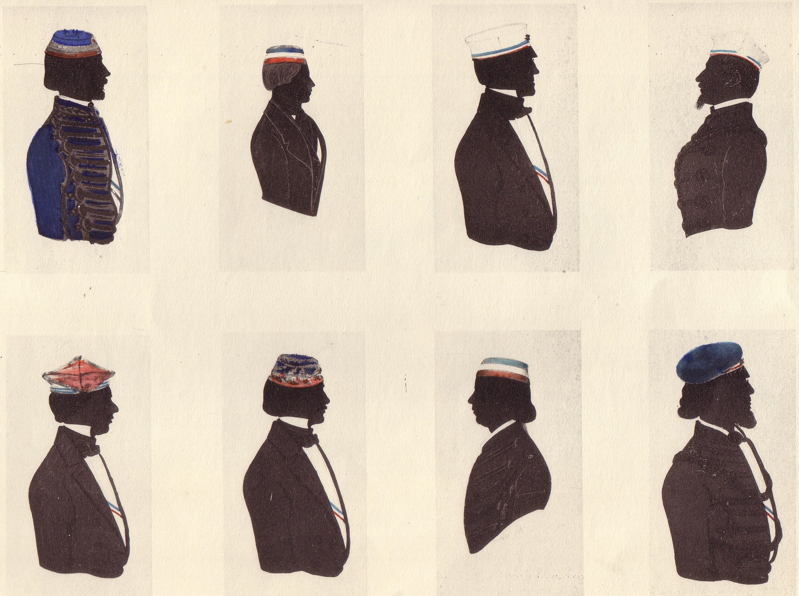 Silhouetten von Studenten der Albertus-Universität Königsberg; alle Angehörige des Corps Masovia